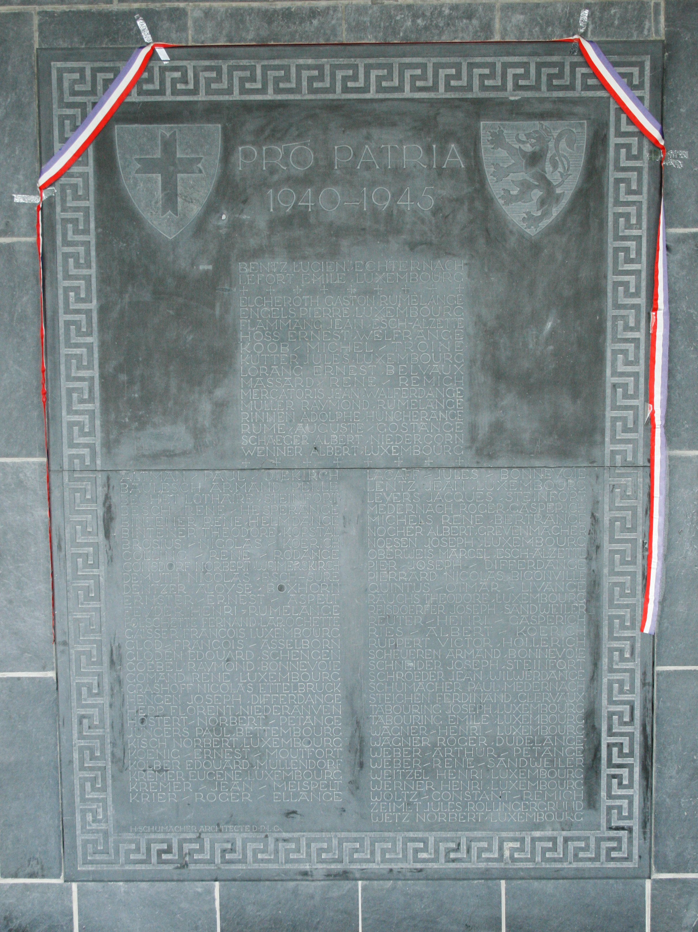 Foto vun der Gedenktafel am Préau vum Athénée de Luxembourg, déi d'Undenken un déi 2 Professeren an déi 76 Schüler aus dem Kolléisch wakereg hält: Si sinn tëschent 1940 a 1945 fir d'Fräiheet vum Lëtzebuerger Land gestuerwen.